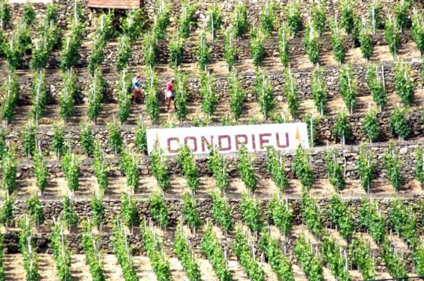 ceci représente le vignoble de Condrieu